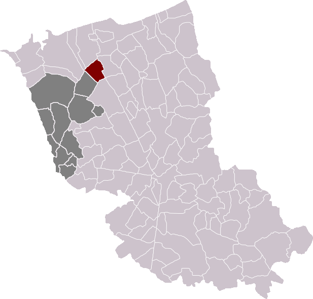 Locatie gemeente Spijker in arrondissement Duinkerke. Zelfgemaakt. Location of Spycker municipality in the arrondissement of Dunkirk. Self made. Localisation de la commune de Spycker dans l'arrondissement de Dunkerque. Fait moi-même.